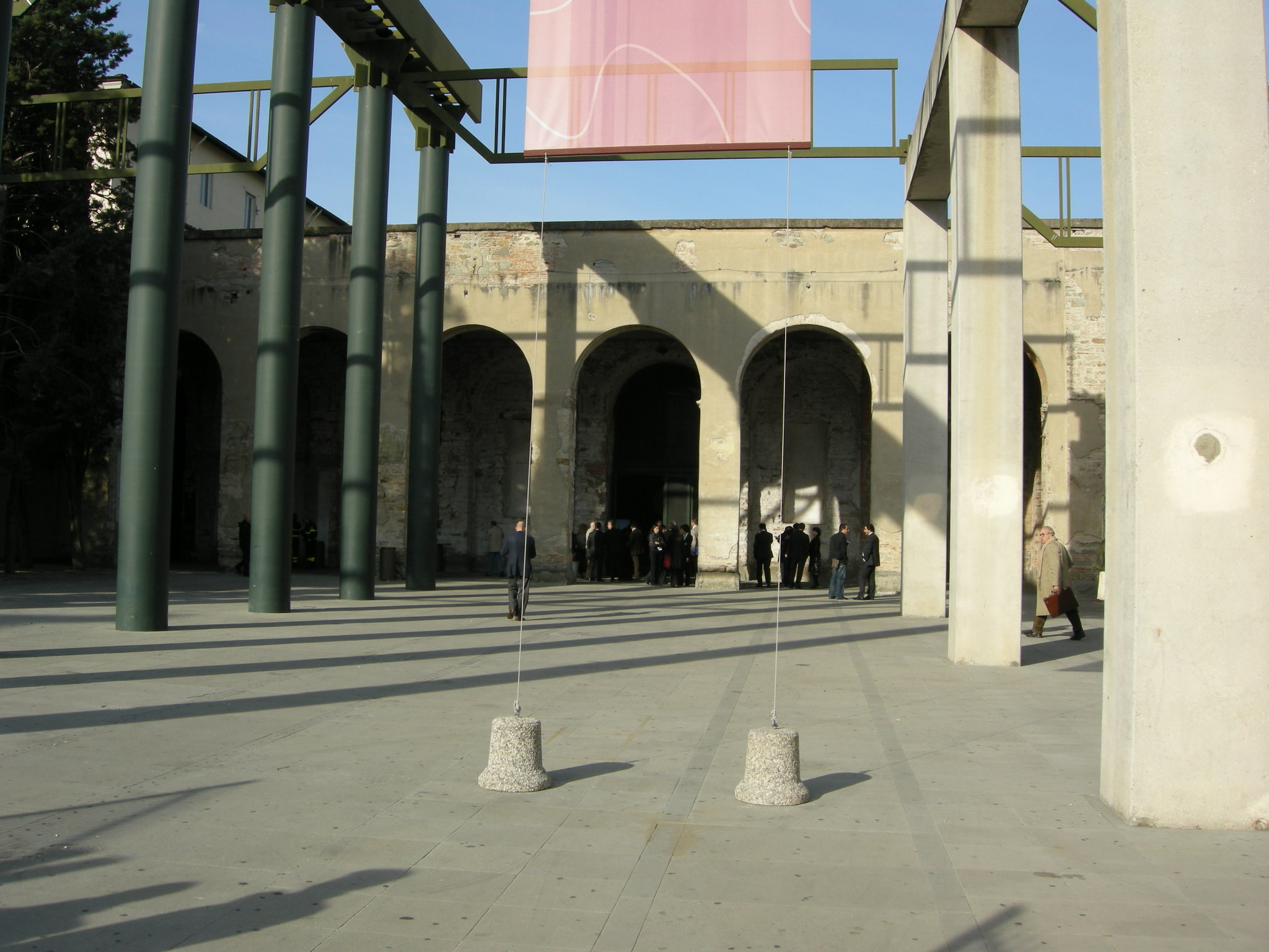 Strazione leopolda, ingresso